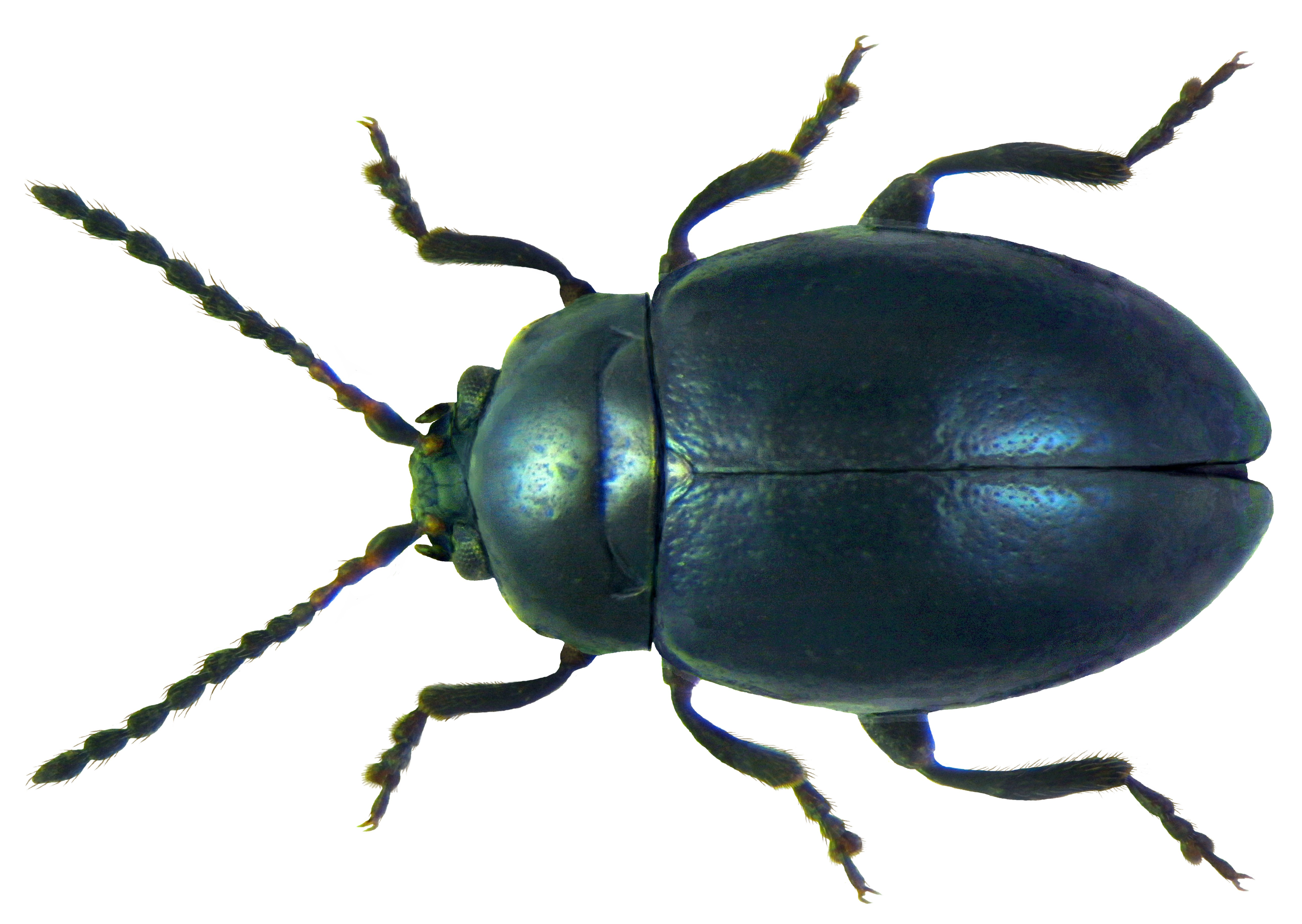 Hermaeophaga mercurialis (Fabricius, 1792) Familie: Chrysomelidae Groesse: 2,3-3,0 mm Verbreitung: Europa Oekologie: an Mercurialis perennis Fundort: Austria, Leitha-Gebirge, Windener Tal leg. G.Roessler, 8.V.1988; det. G.Roessler, 1996 Photo: U.Schmidt, 2011